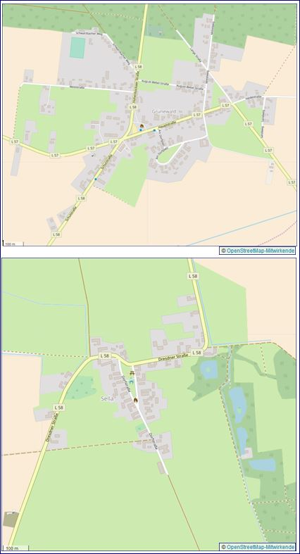 Grünewald Stadtplan - mit OT Sella